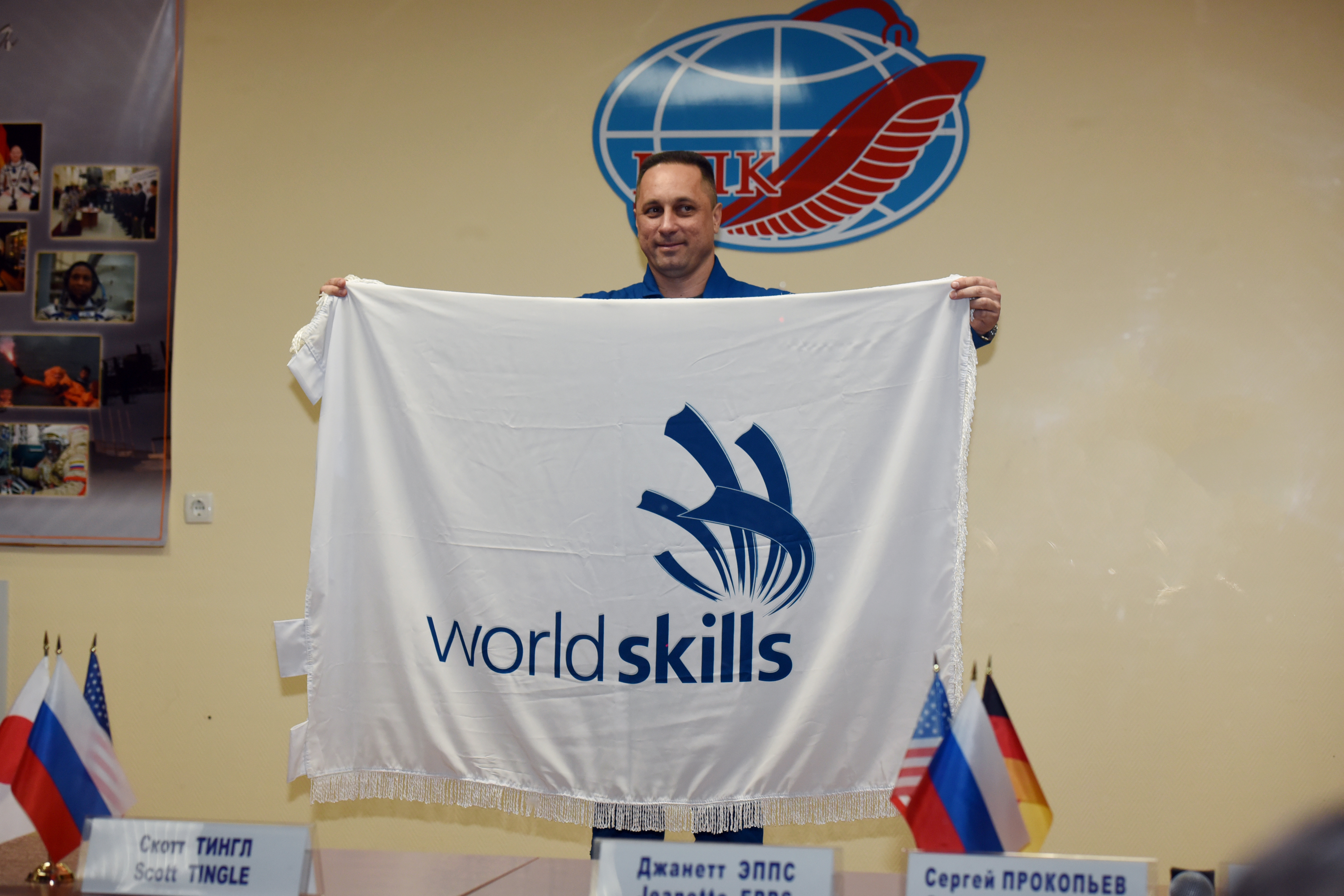 17 декабря 2017 года флаг движения WorldSkills отправится на Международную космическую станцию на борту корабля «Союз МС-07», стартовавшего с космодрома Байконур. Флаг – в руках летчика-космонавта РФ, отряда ФГБУ ЦПК Антона Николаевича Шкáплерова (Россия).